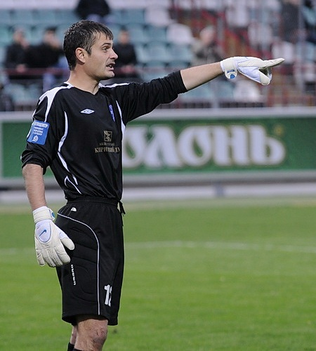 Дмитрий Стойко в матче «Таврия» — «Оболонь»